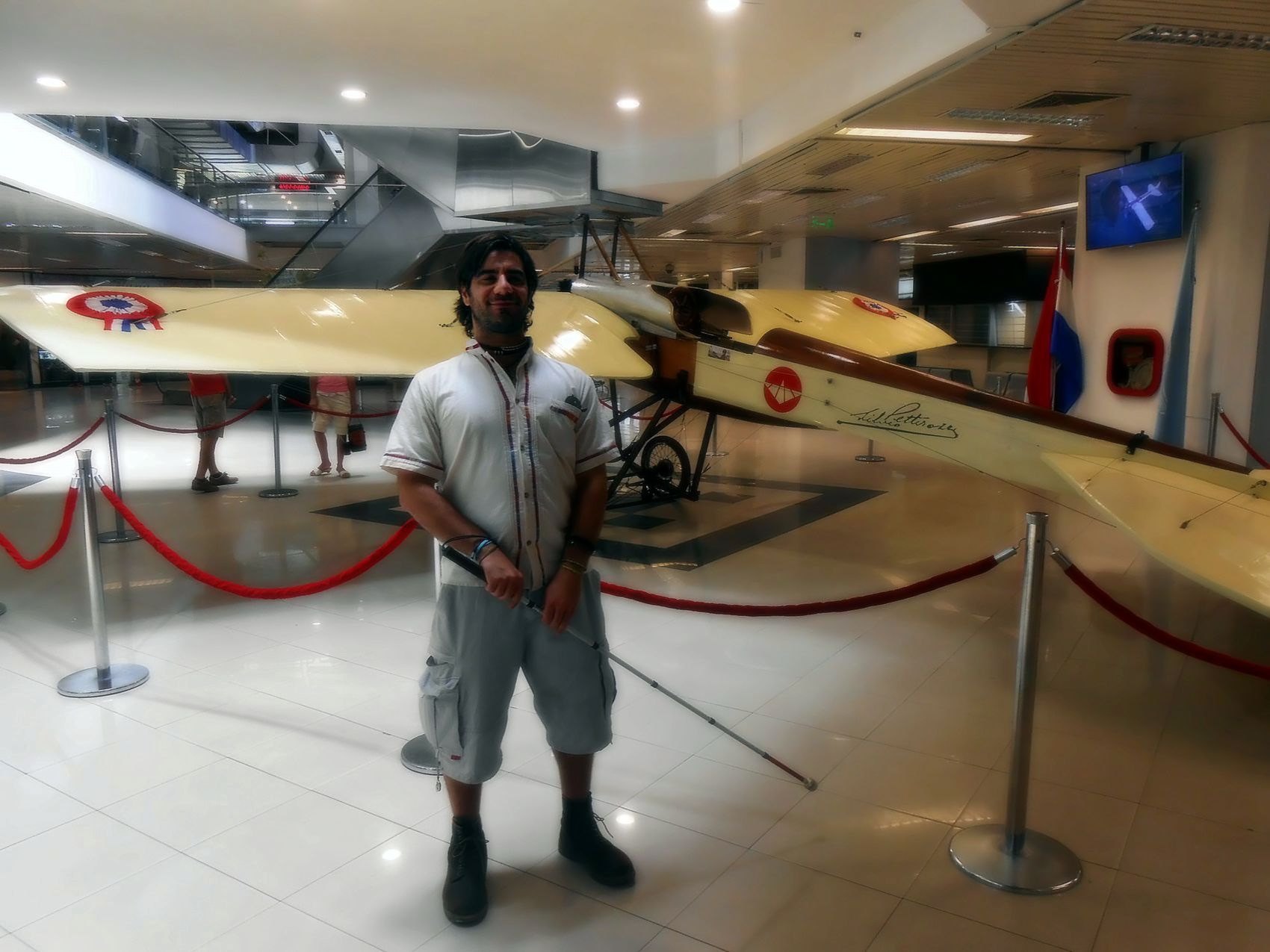 Avañe'ẽ: Alessandro Bordini Aviõ veveharenda Silvio Pettiróssi-pe